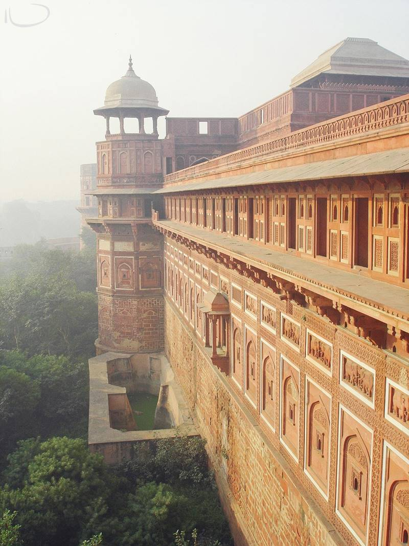 Qırmızı Qala